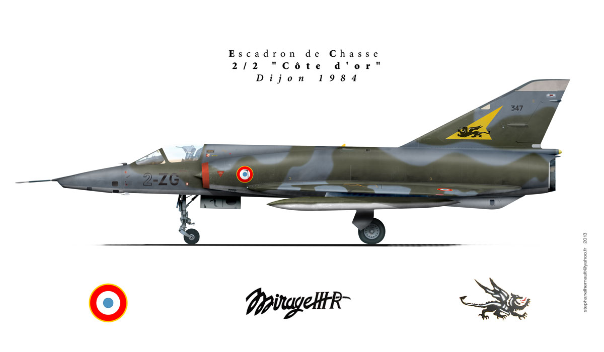 Mirage III R escadron cote d'or